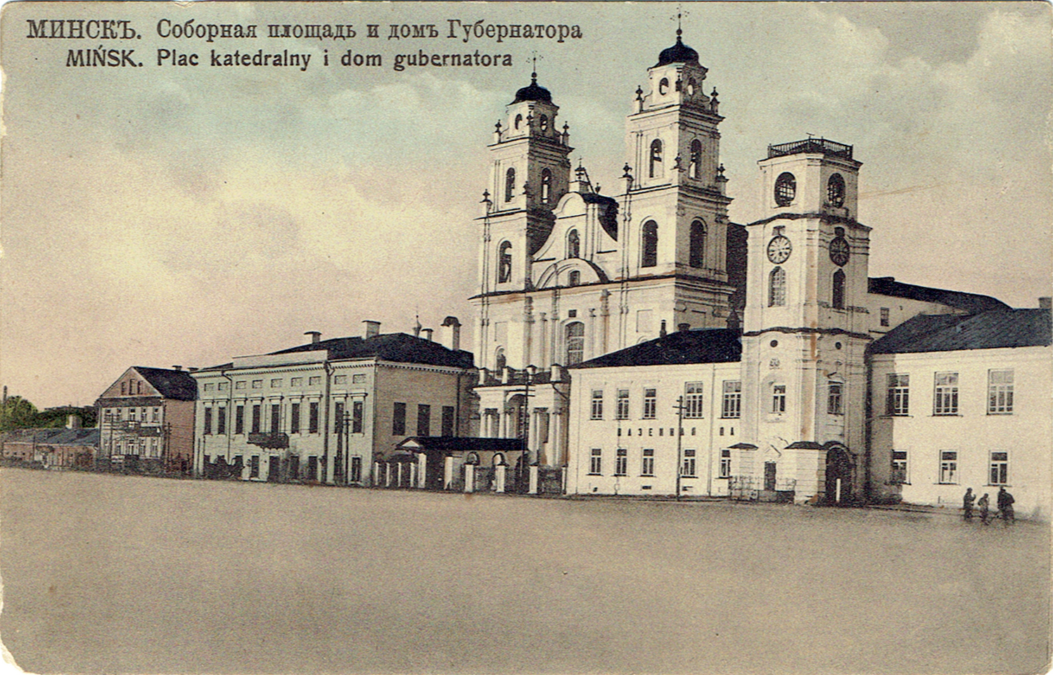 Беларуская (тарашкевіца): Менск (Miensk), Высокі Рынак (Vysoki Rynak). Катэдральны касьцёл Імя Найсьвяцейшай Панны Марыі (Katedra)